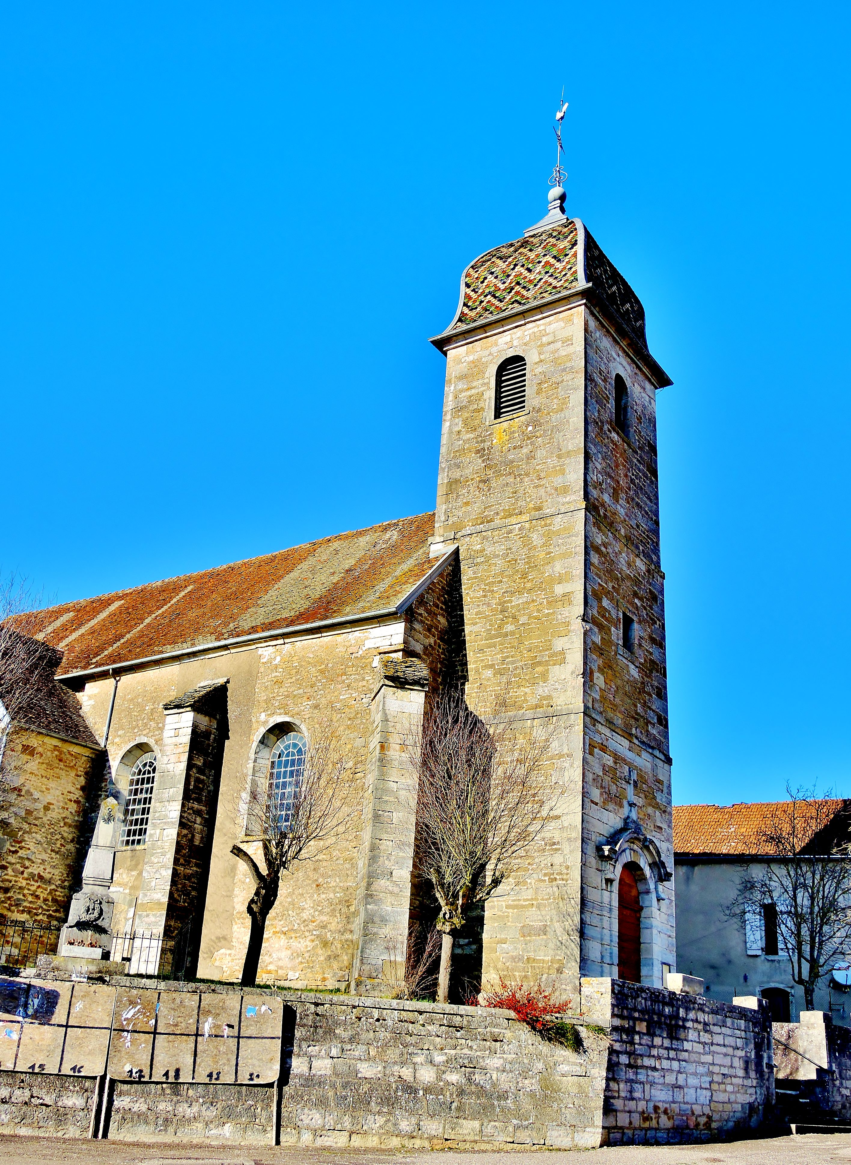 Eglise de Granvelle. Département de la Haute-Saône.